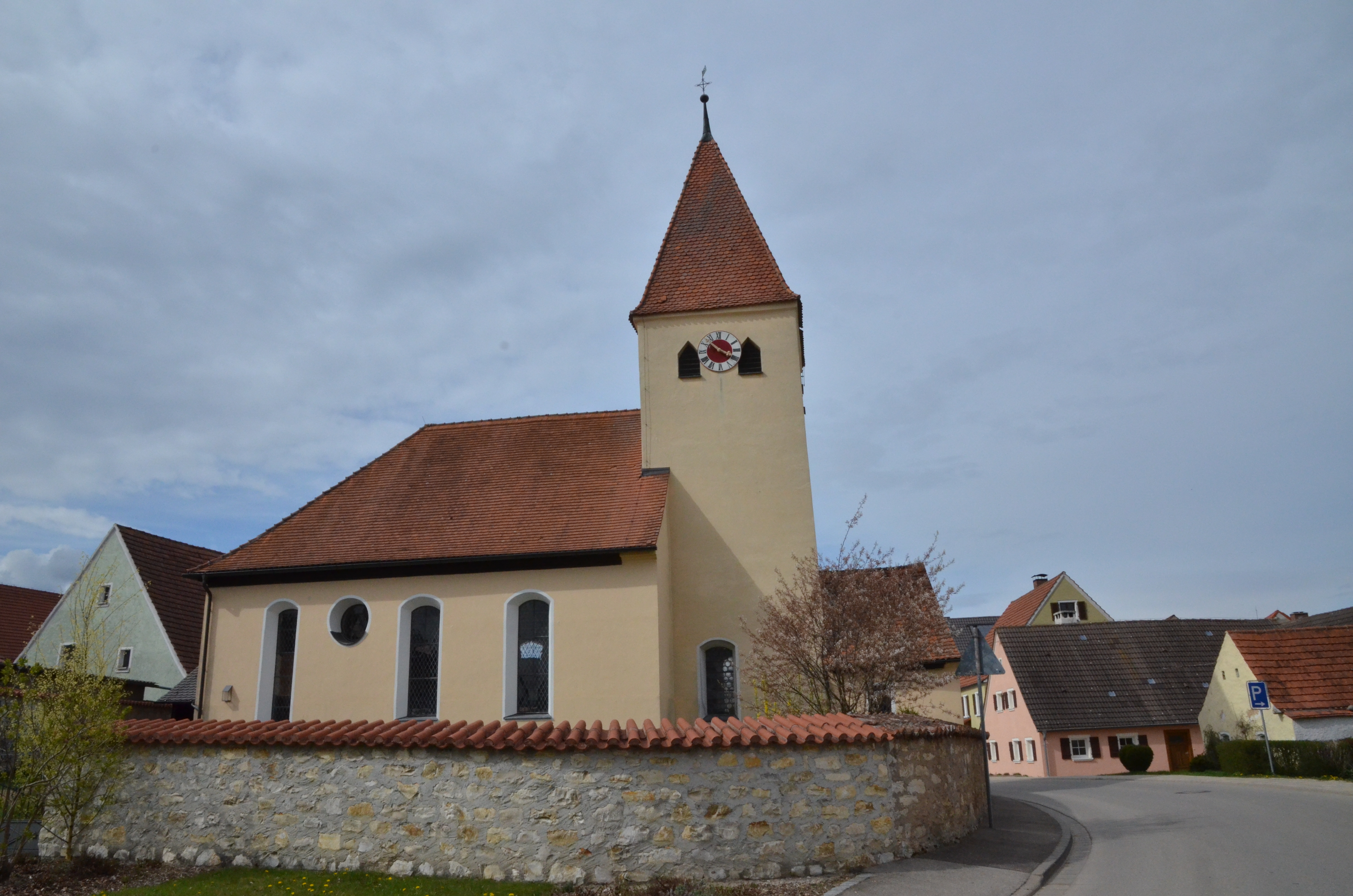 evang.-luth. Kirche St. Leonhard und Nikolaus in Hüssingen